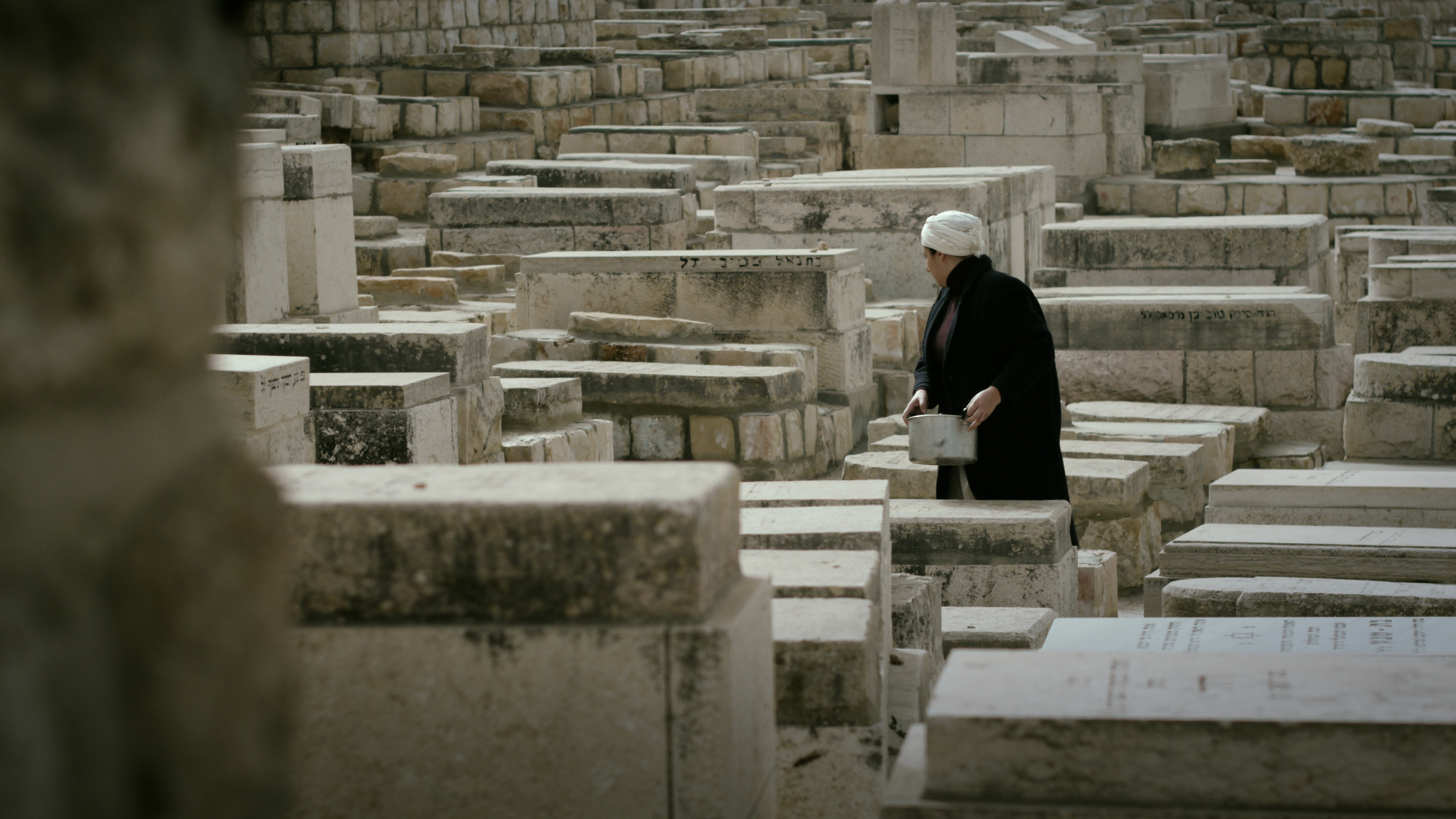 שני קליין בסרט ההר